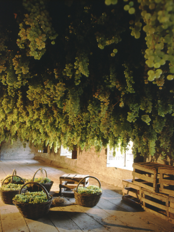 Uva Garganega appesa ai travi